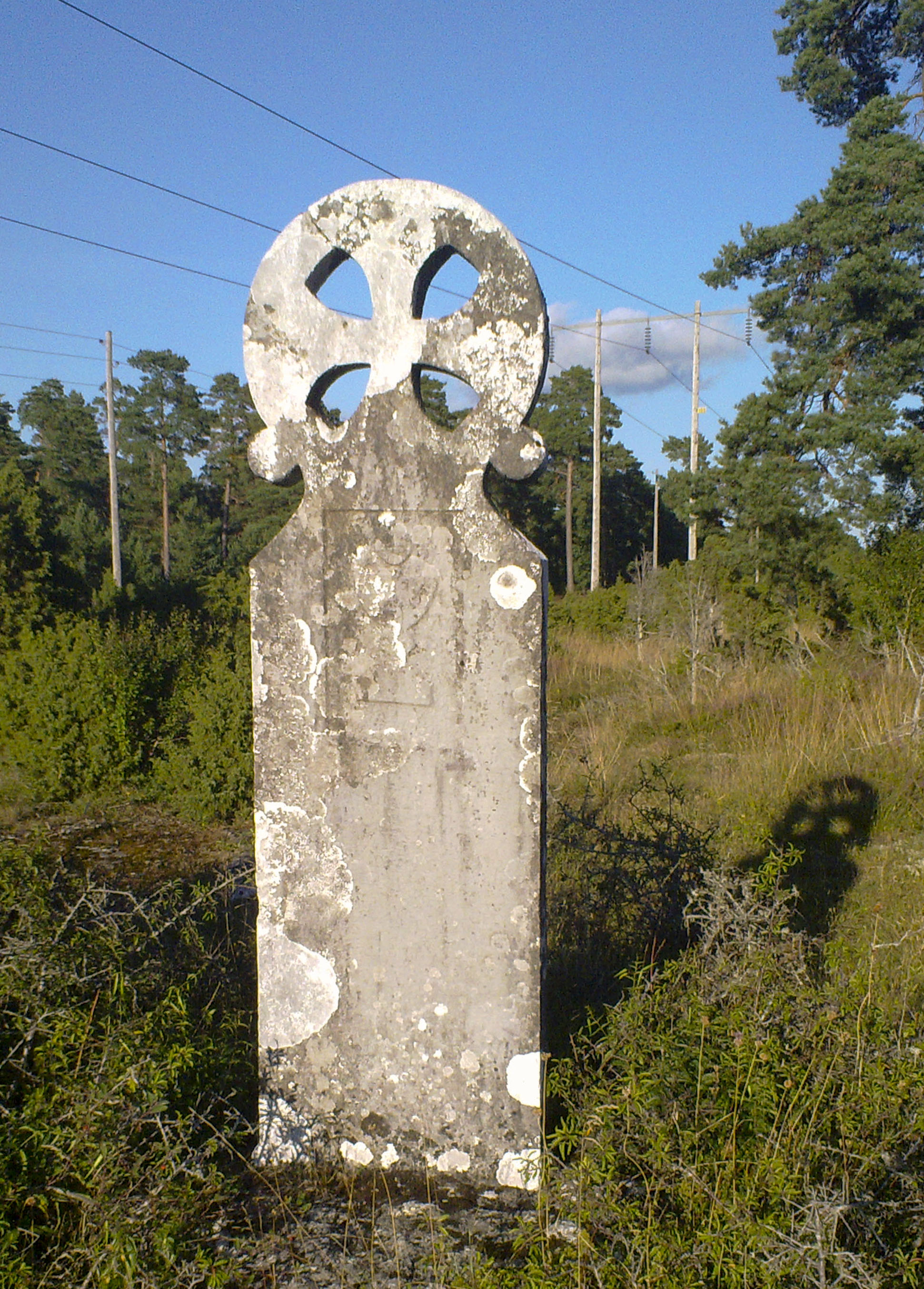 Stenkors från medeltiden, RAÄ nr Endre 34:1. Rest över kyrkoherden herr Jörgen i Endre, som skall ha omkommit här 1336